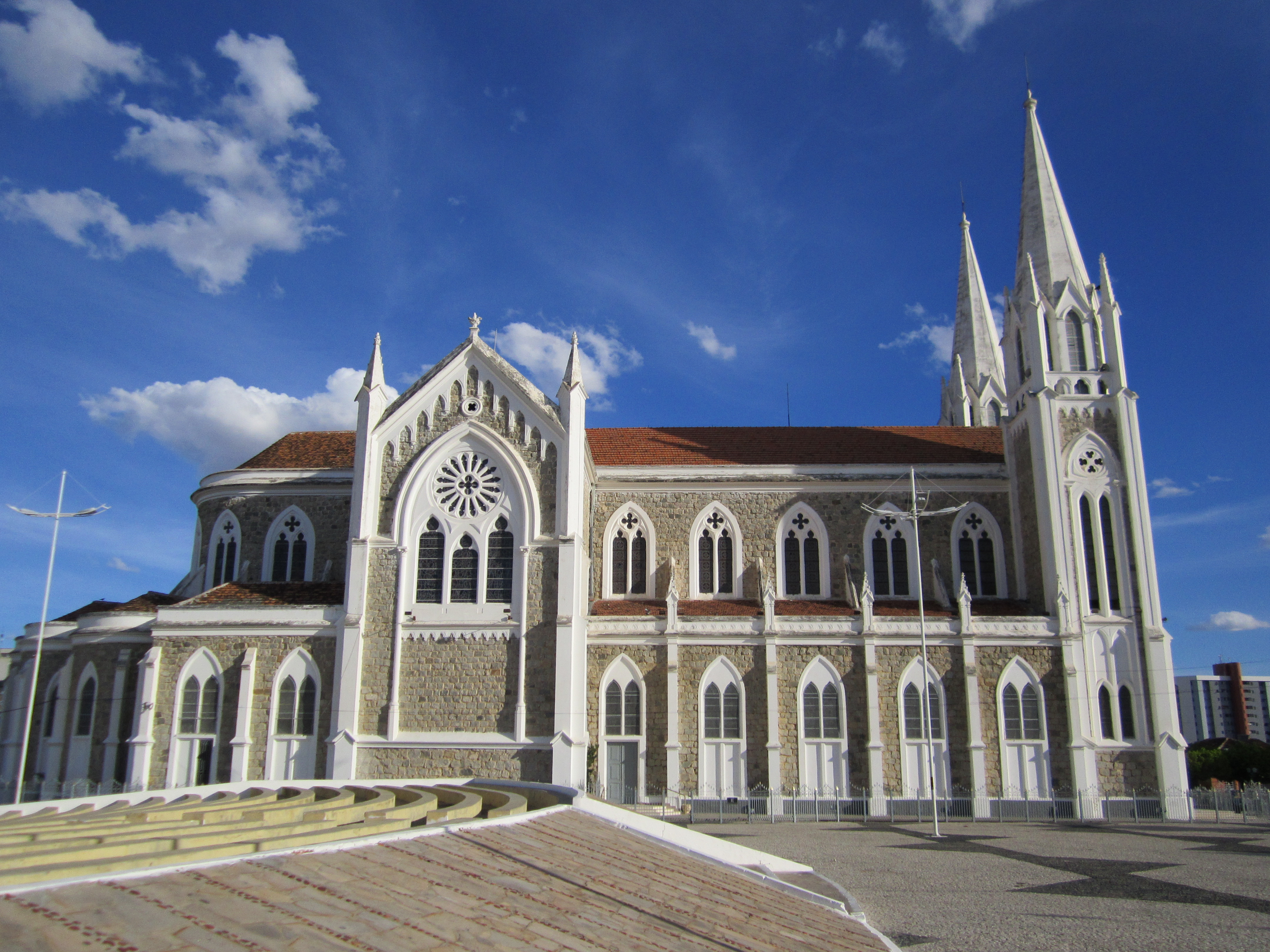 Catedral – Igreja Sagrado Coração de Jesus - Petrolina, Pernambuco, Brasil